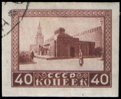 Почтовая марка СССР К первой годовщине со дня смерти В. Ленина. Без зубцов